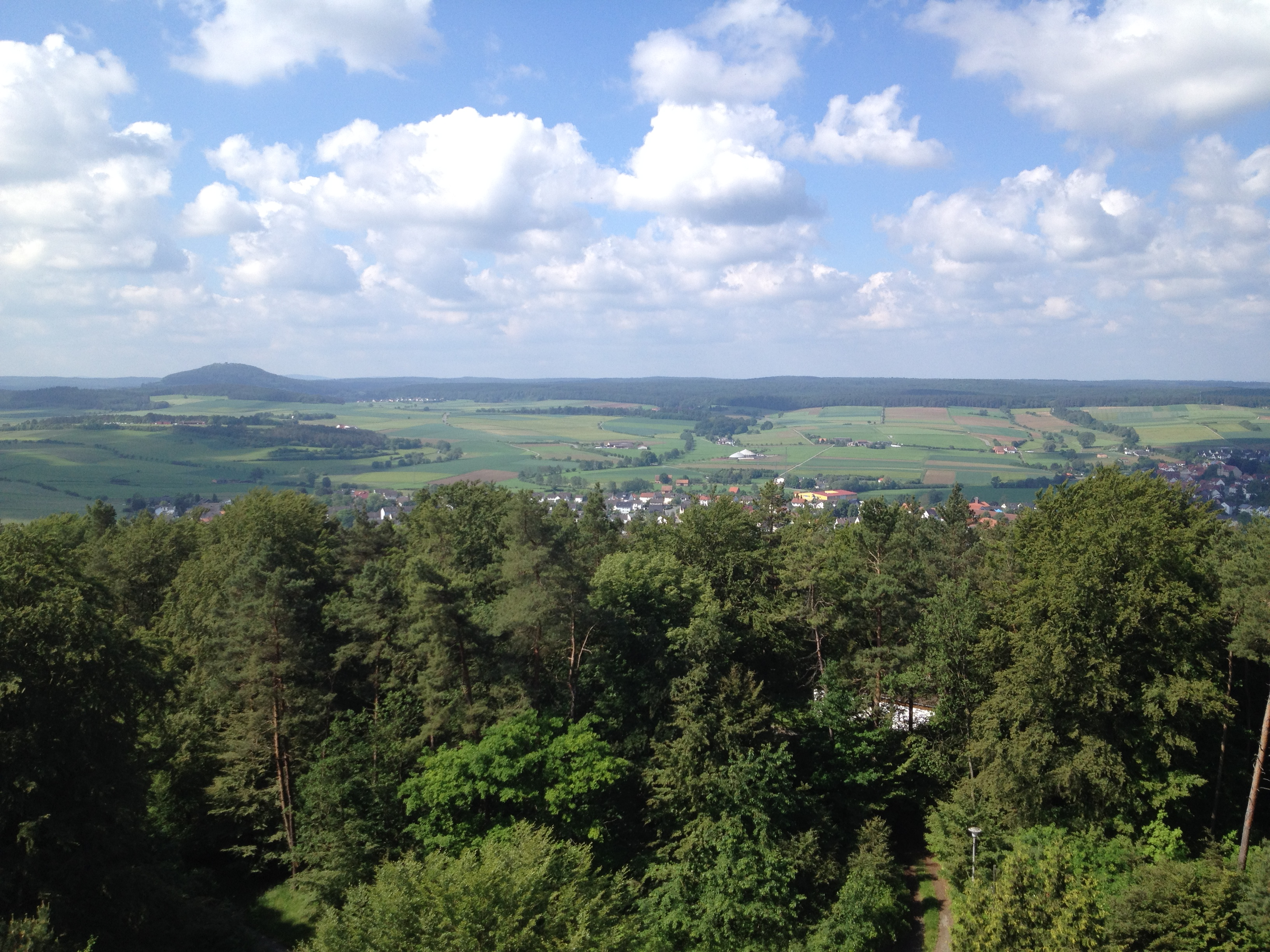 Blick vom Ofenbergturm auf Wolfhagen, links ist der Weidelsberg mit der Burgruine Weidelsburg zu erkennen